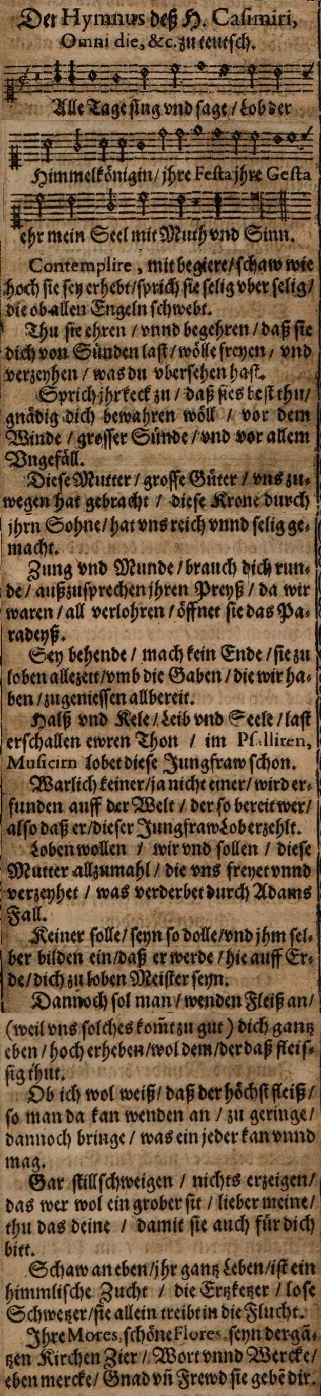 Barocke Nachdichtung des lateinischen Marienhymnus Omni die dic Mariae